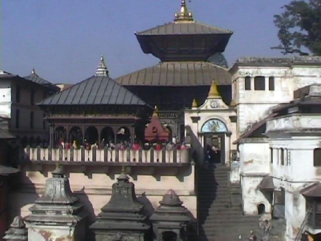 Храм ПашупатиХрам Пашупатинатх в Непале